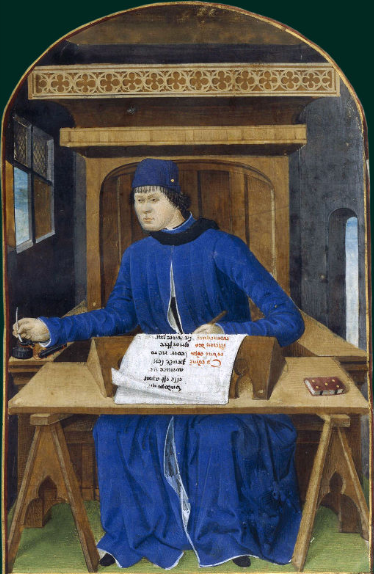 Pierre Le Baud ecrivant